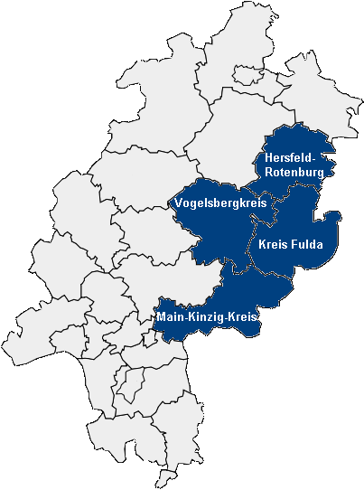 Osthessen